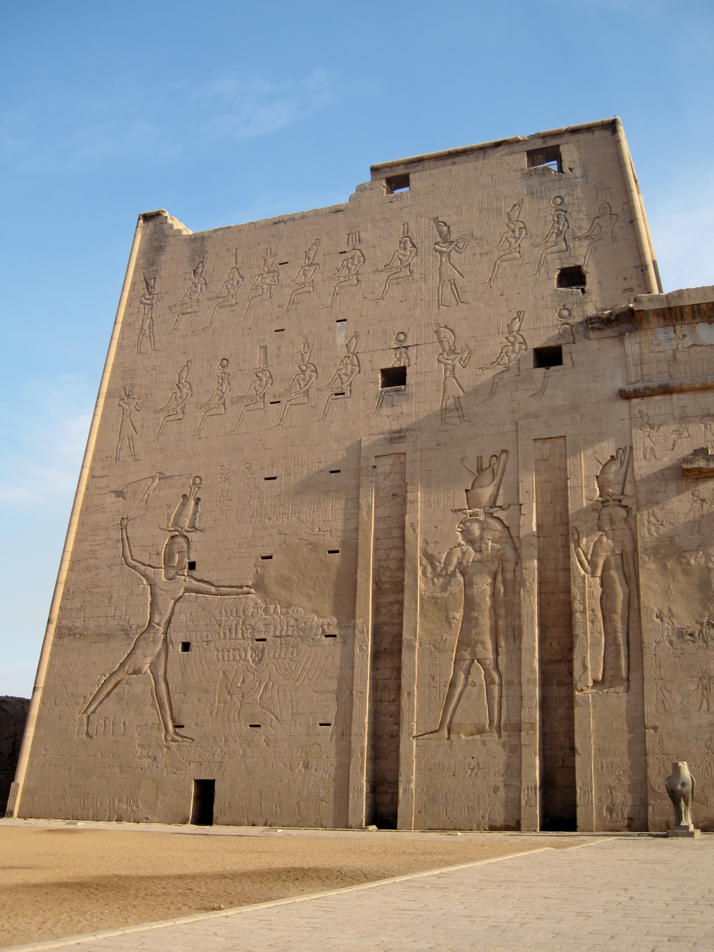 Linker Turm des Tempelpylons von Edfu, Ägypten